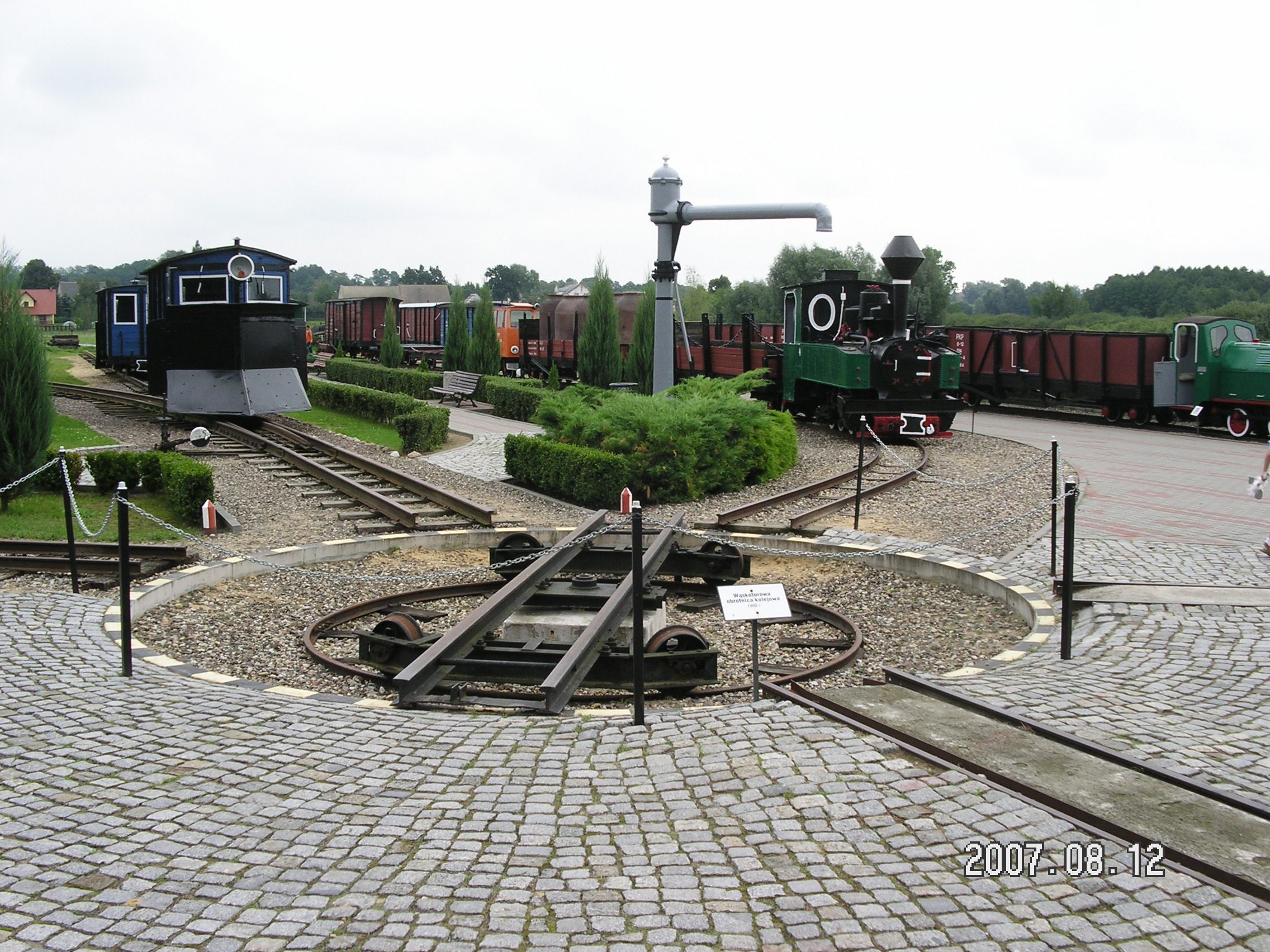 Gmina Żnin, Poland